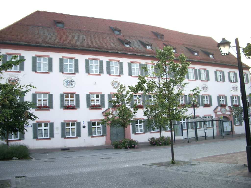 Erding Rathaus